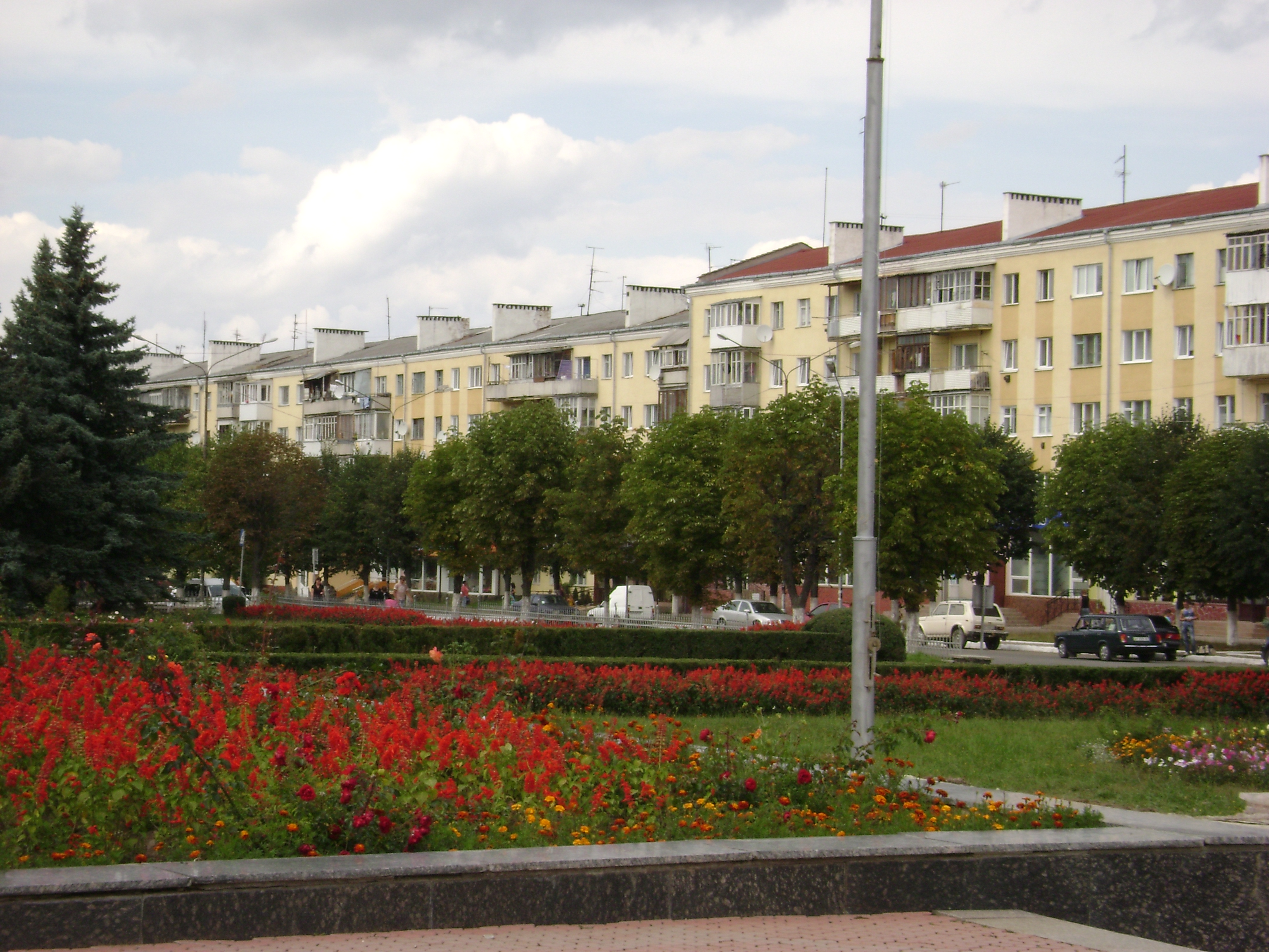 пр. Незалежності. Own work зроблене в серпні 2009 р.